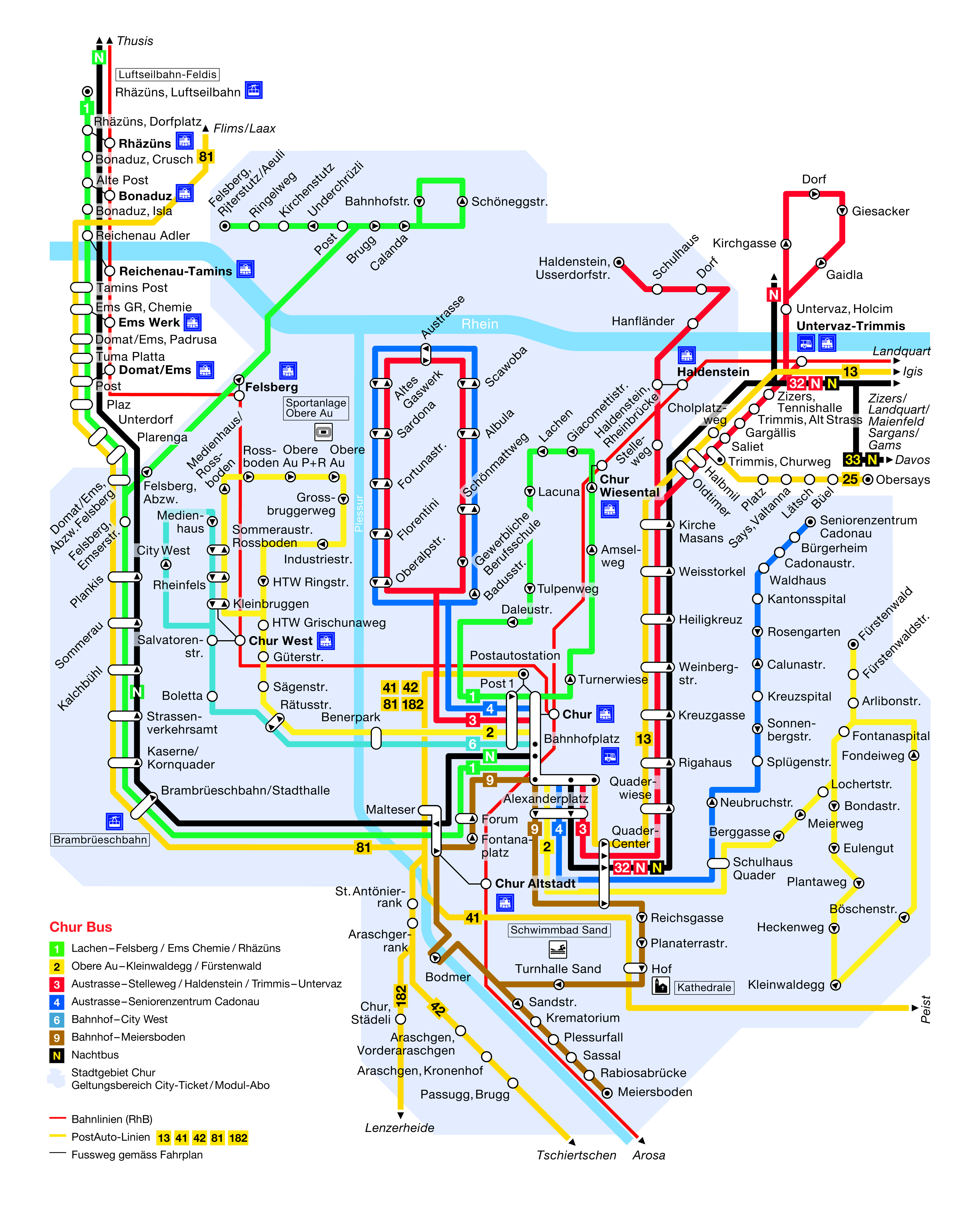 Linienplan Chur Bus